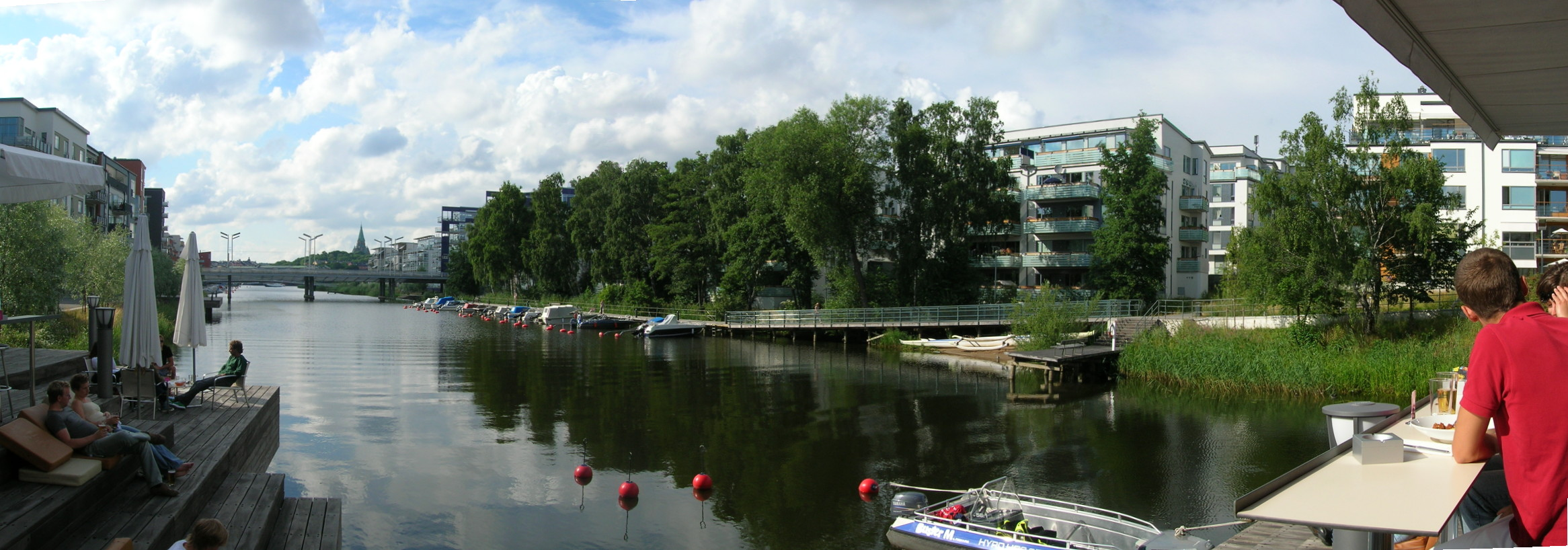 Sickla kanal at Södra Hammarbyhamnen, Stockholm, Sweden.